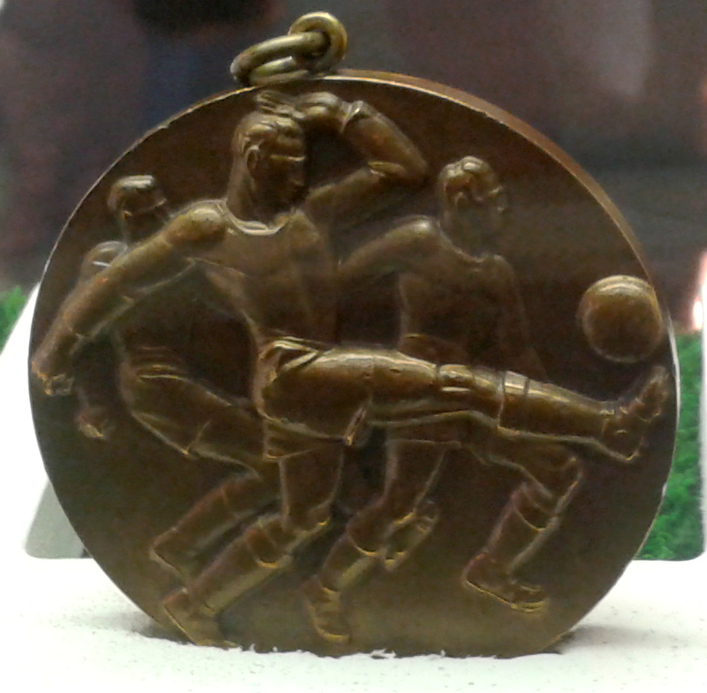 Bronzemedaille der Fußball-WM 1934 bei der Deutschland Dritter wurde. Exponat in der Otto-Siffling-Ausstellung in der Alten Feuerwache in Mannheim.